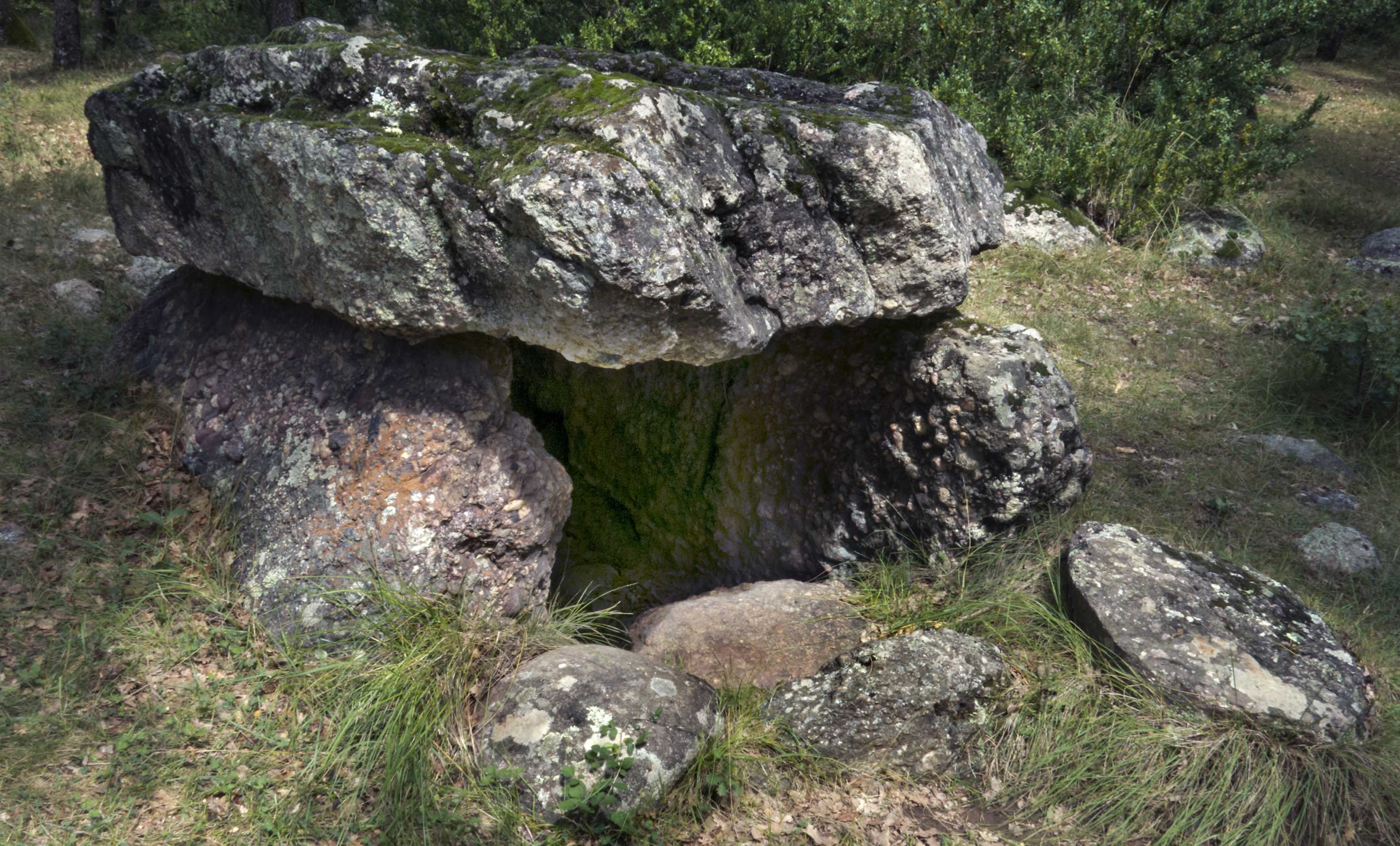 En Areny de Noguera, a la Baixa Ribagorça. És una construcció megalítica, del neolític.